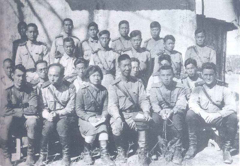 1943년 10월 5일 야전 훈련 후 촬영한 제88국제여단 대원 사진. 제1열 좌로부터：바탈린( N. S. Batalin, 巴达林, 소련), 정치 부여단장 이조린(李兆麟, 일명 張壽籛[张寿篯], 중국), 왕일지(王一知, 주보중 부인), 여단장 주보중(周保中, 중국), 김일성(金日成, 제1영장, 조선), 부여단장 시린스키(Timofei Nikitovich Shirinsky, 什林斯基, 1904~?)。제2열：장광적(张光迪, 중국), 풍중운(冯仲云, 중국), 왕효명(王效明, 중국), 왕명귀(王明贵, 중국), 팽시로(彭施鲁, 중국)。제3열：양청해(杨清海, 중국), 서철(徐哲, 조선), 강신태(姜信泰, 강건, 조선), 김광협(金光侠, 조선), 수장청(隋长青, 중국)。제4열 : 안길(安吉, 조선), 박덕산(朴德山, 조선), 최용진(崔勇进, 조선), 도우봉(陶雨峰, 중국), 김경석(金京石, 조선)。 : 사진 속의 소련 인명 확인 자료